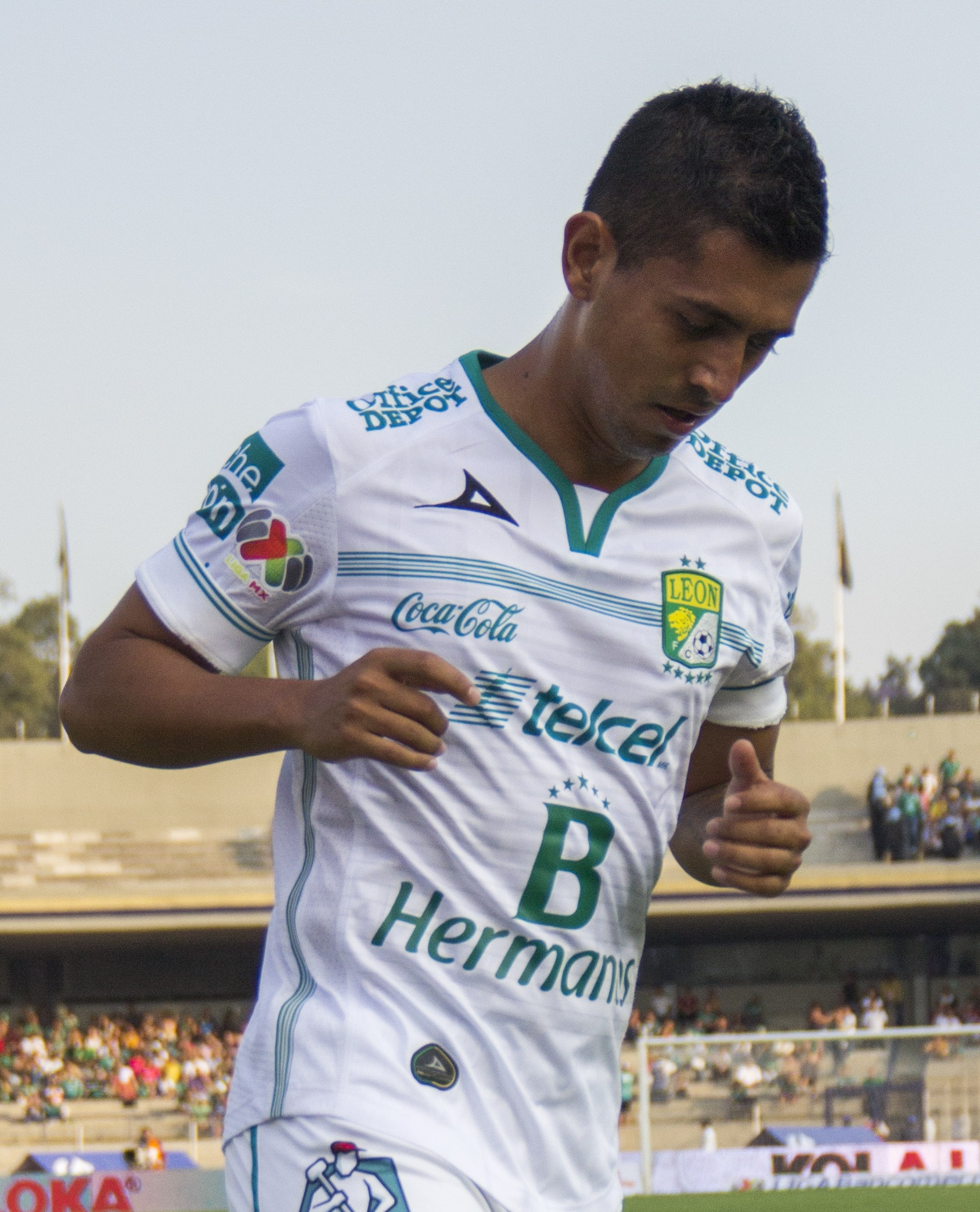 Elías Hernández en 2016